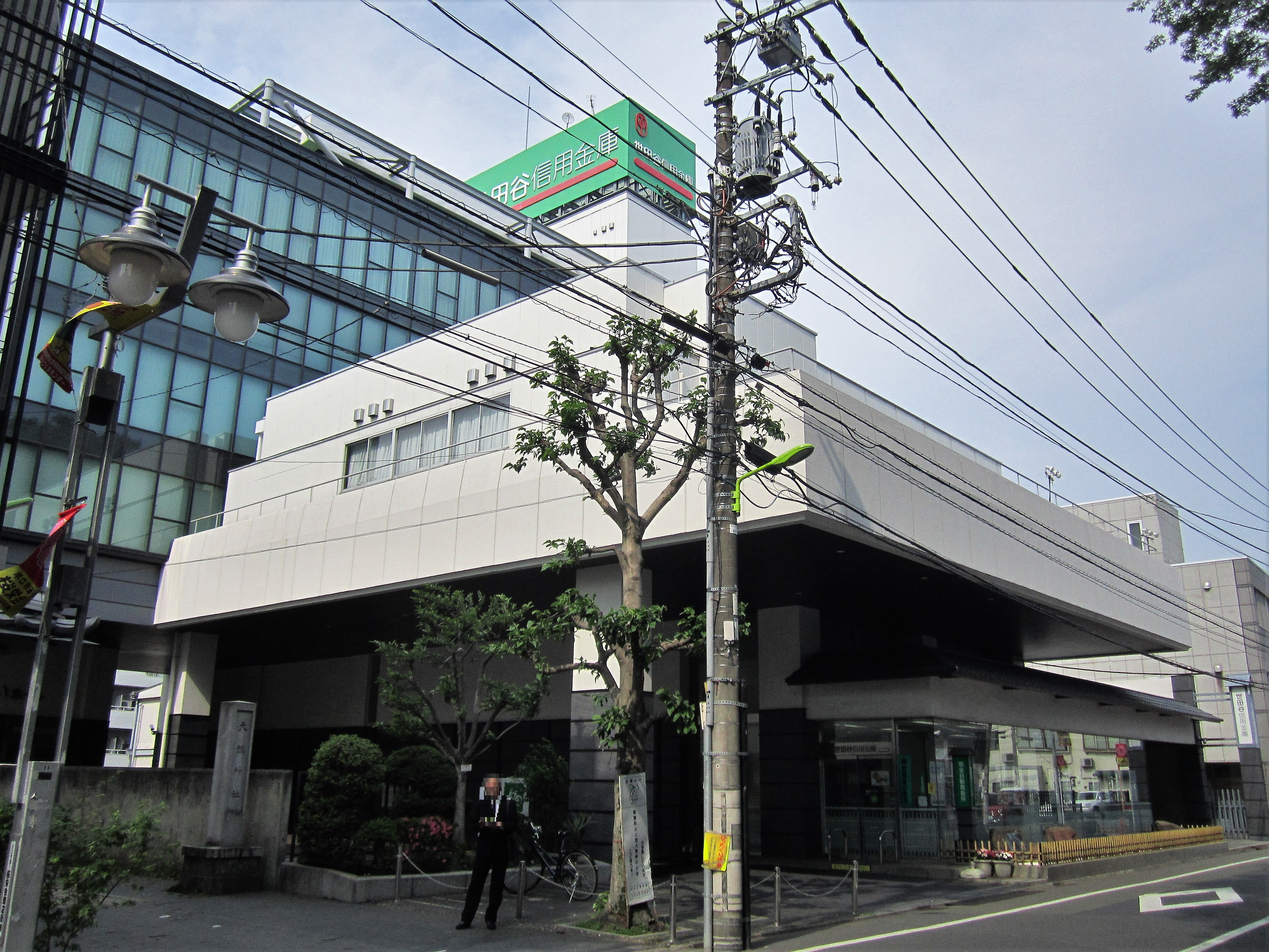 世田谷信用金庫 本店（世田谷区世田谷）